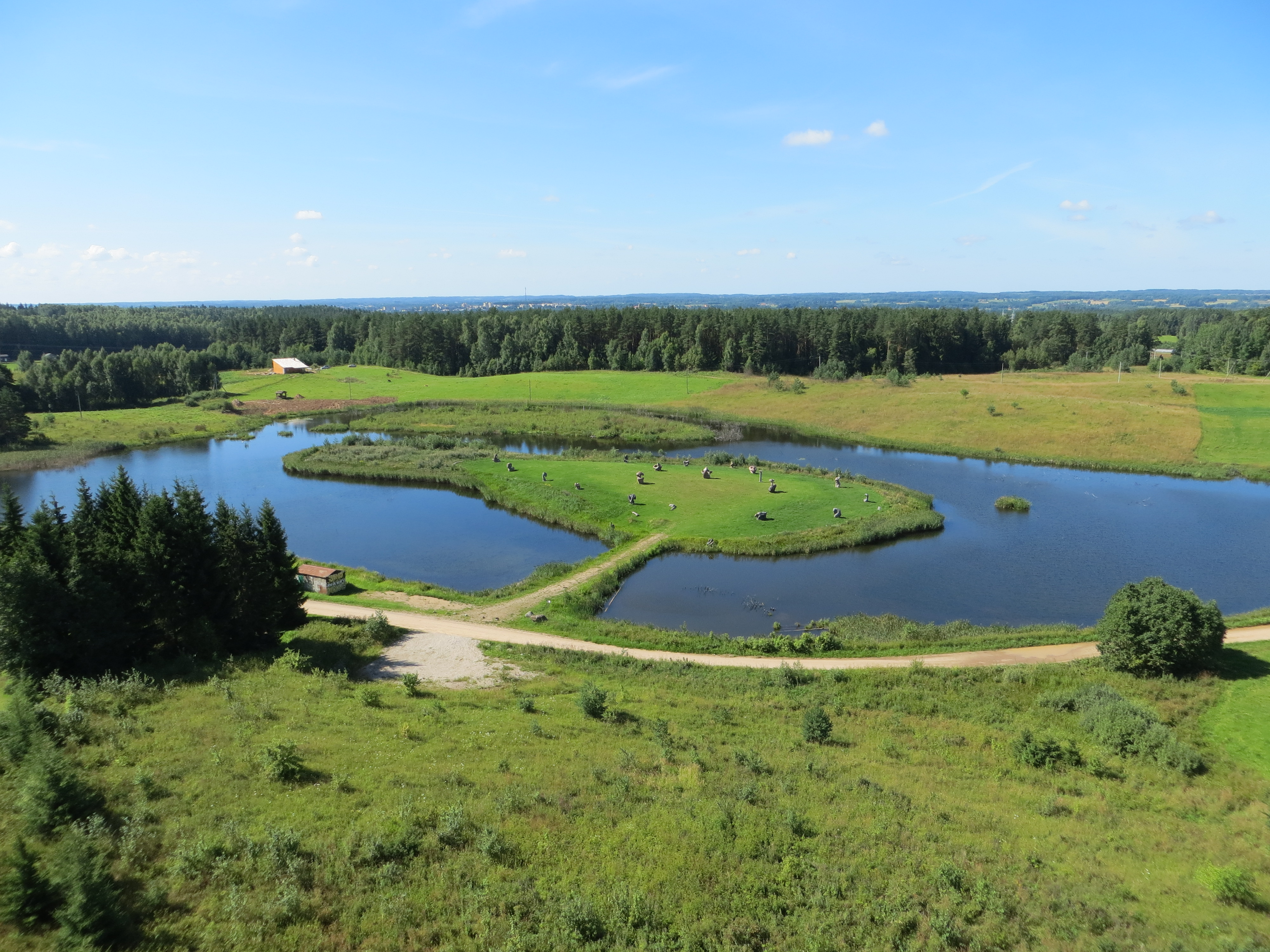 Sirutėnai, Lithuania